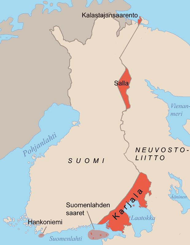 Suomen Moskovan rauhassa vuonna 1940 menettämät alueet.